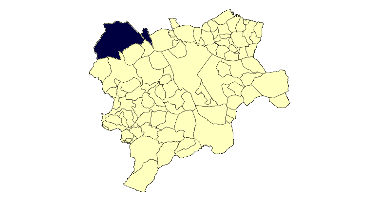 Mapa que resalta los municipios de la Mancha Centro sobre los de la provincia de Albacete.